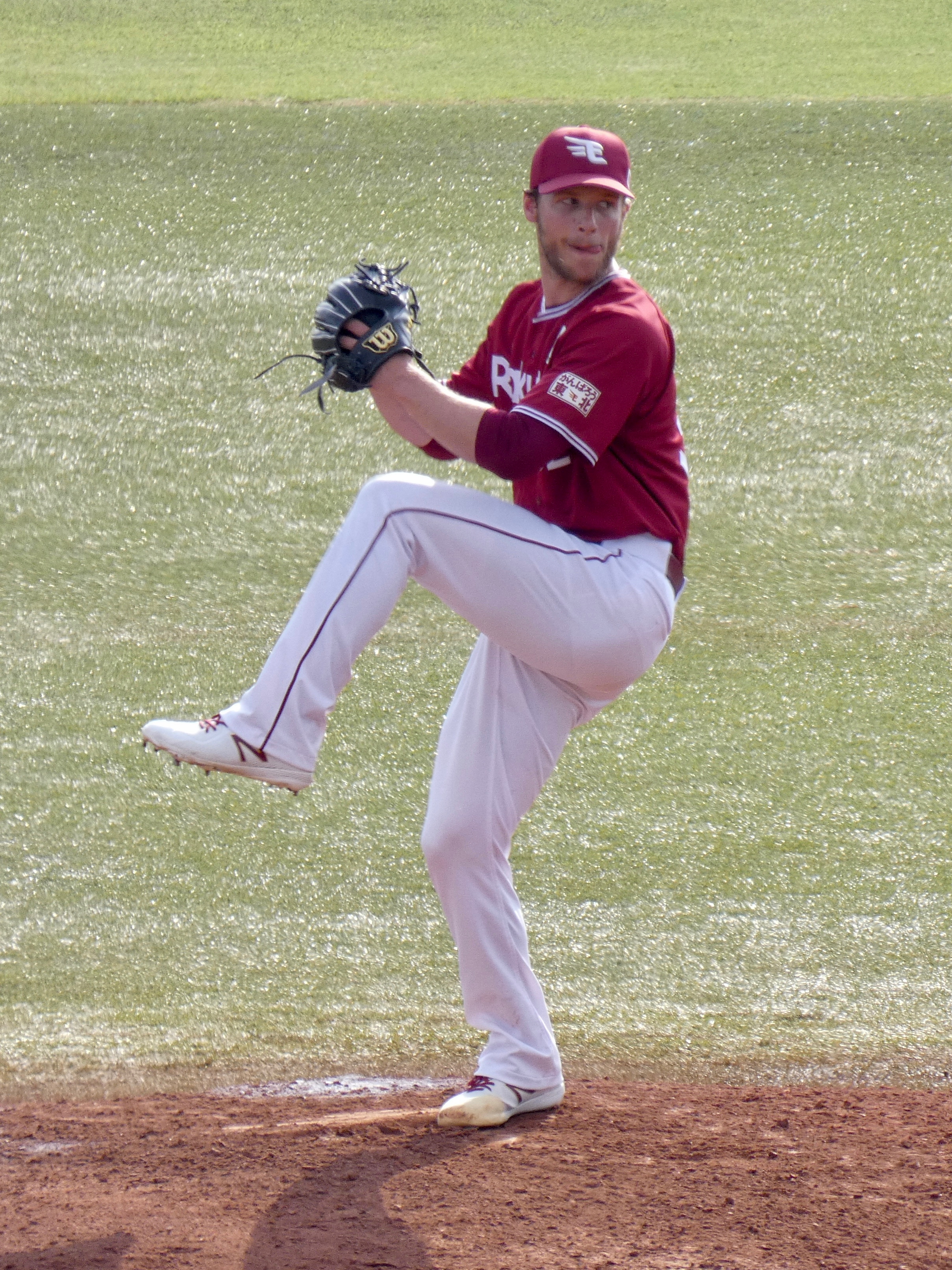 東北楽天ゴールデンイーグルスの選手「アラン・ブセニッツ」。ヤクルト戸田球場にて。